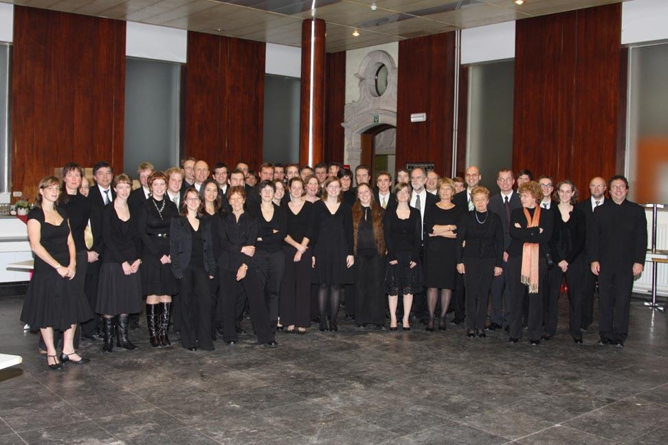 OVSO 2008 - groepfoto